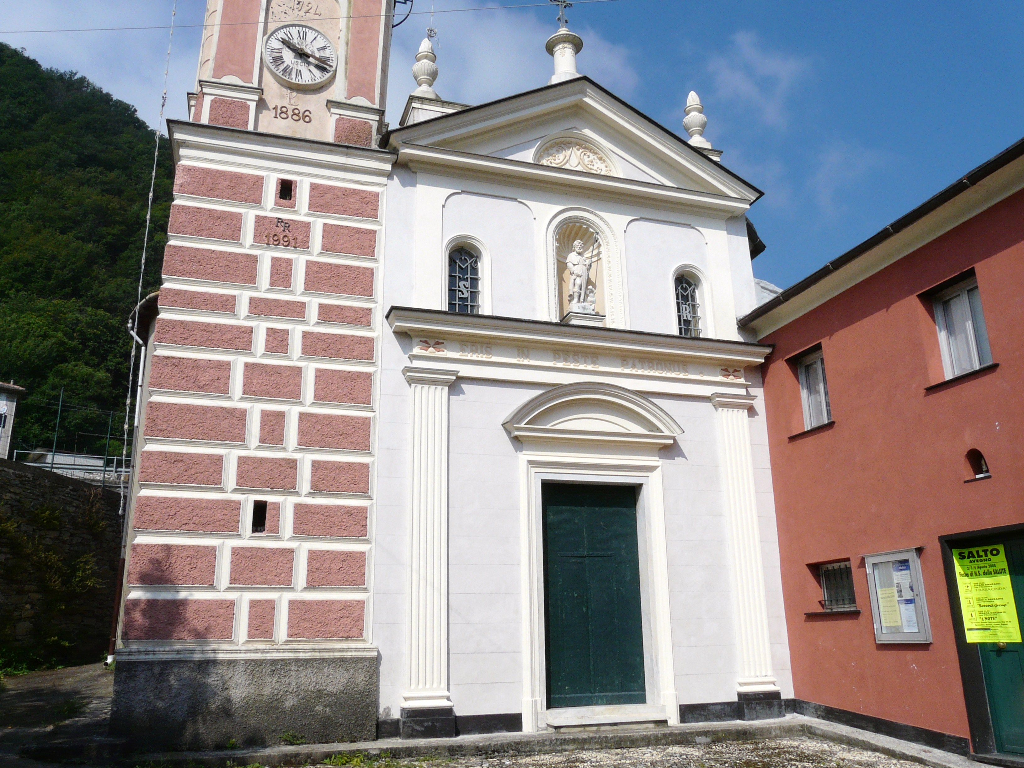 Chiesa di San Rocco presso la frazione Terrile, Uscio, Liguria, Italia